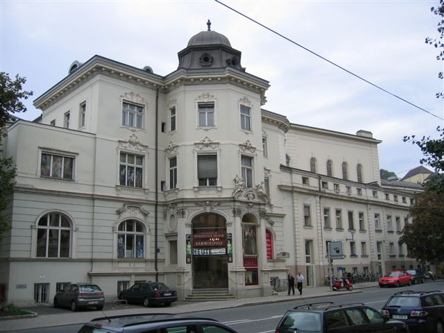 Gebäude des Salzburger Marionettentheaters, ehemaliges Hotel Mirabell. Salzburg.